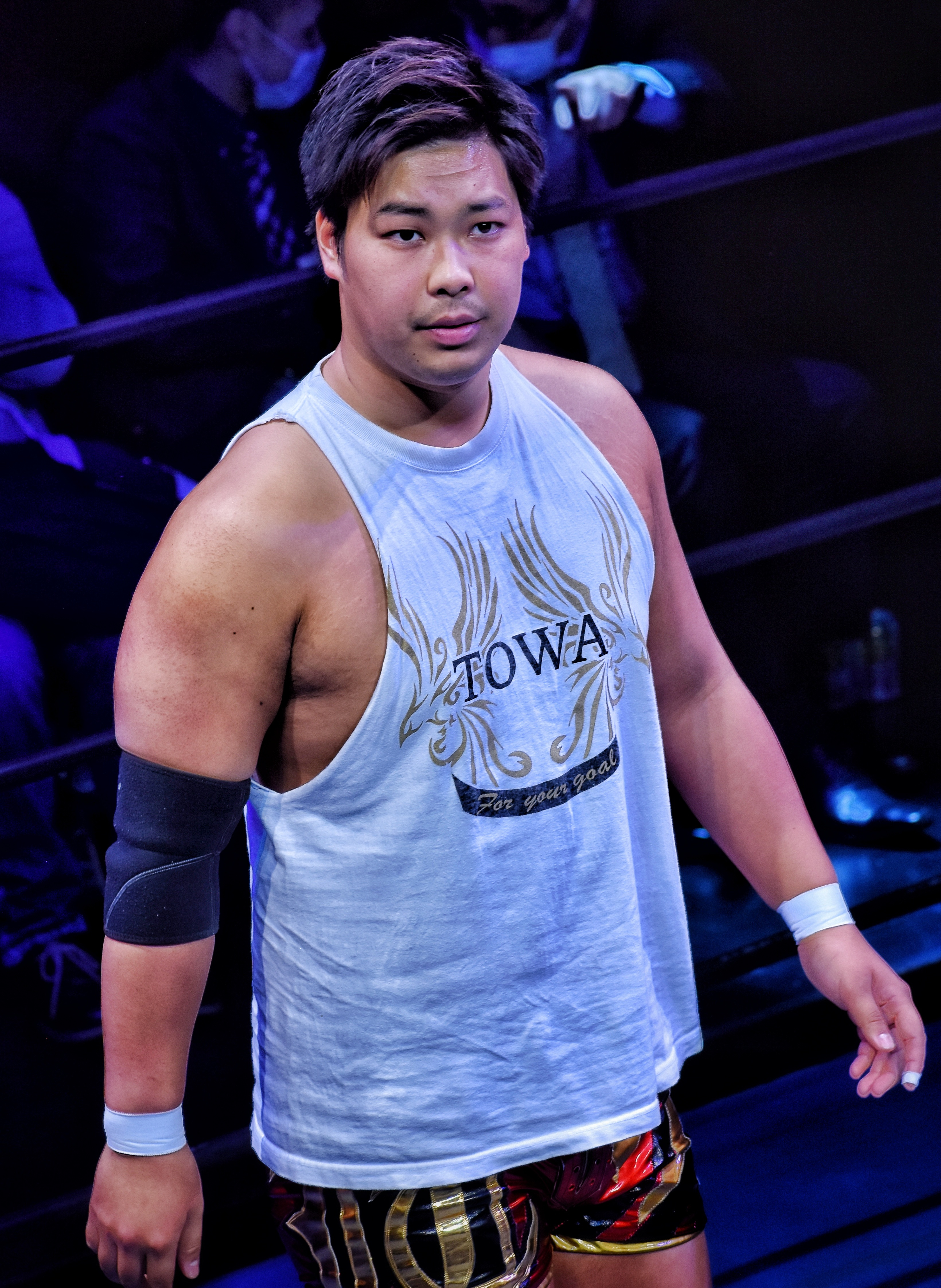 プロレスラーの岩崎永遠